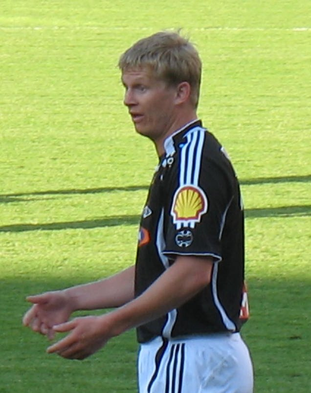 Fotballspilleren Steffen Iversen